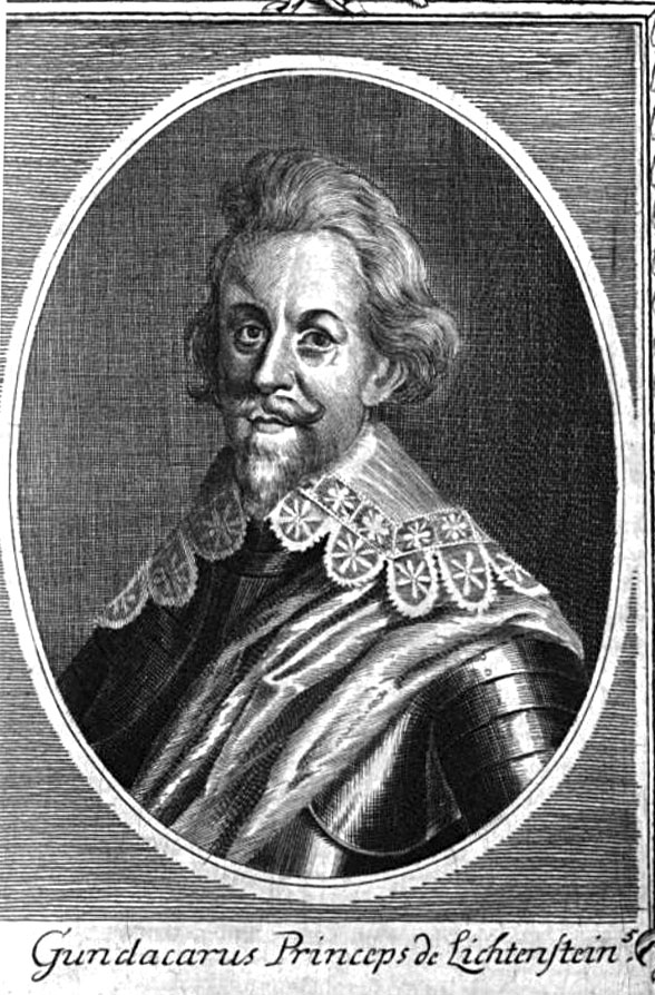 Gundaker von Liechtenstein (seit 1623 Fürst) (1580-1658)